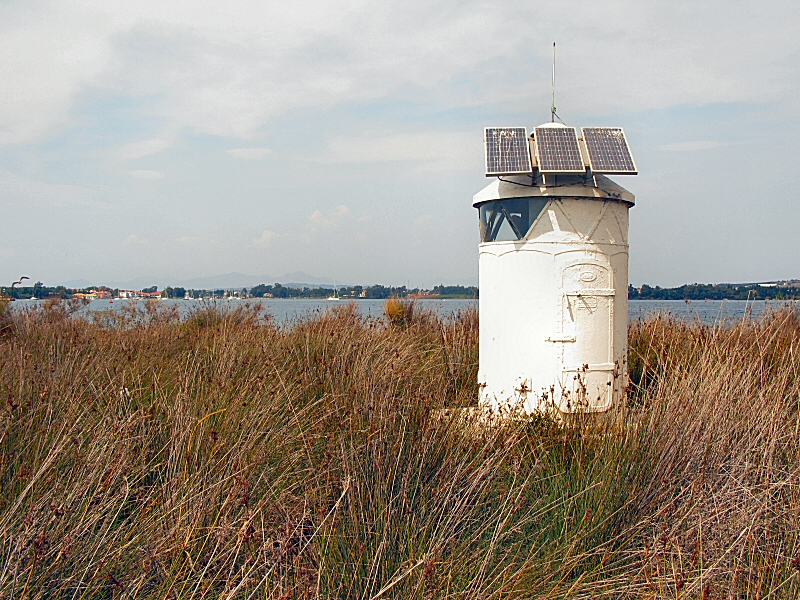 Ο μικρός φάρος στο Άκτιο